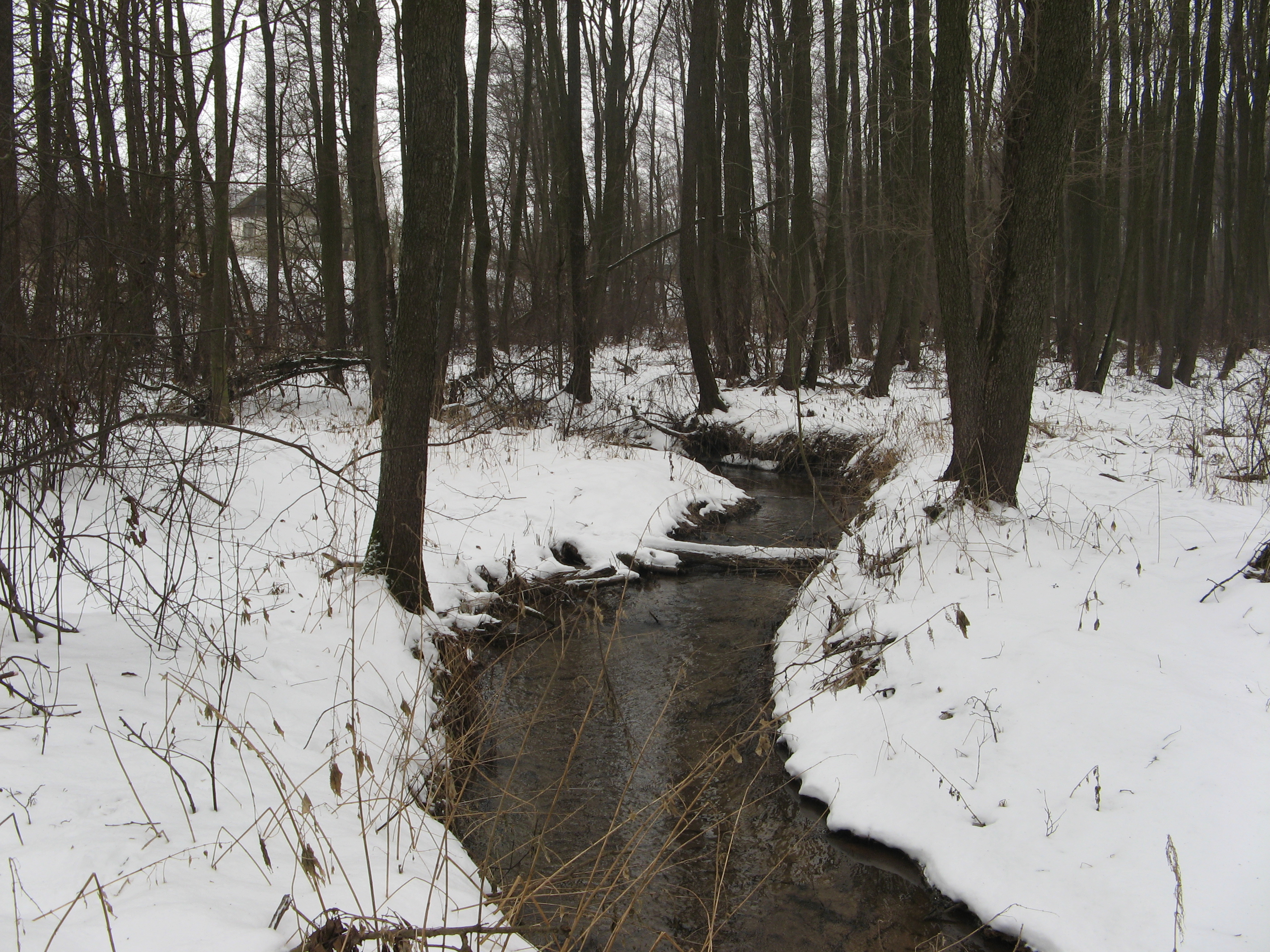 Река Кохля. В районе деревни шелеговка.